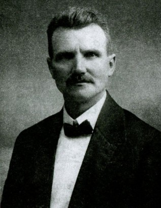 František Jech, pedagog, historik, muzejník, sokol